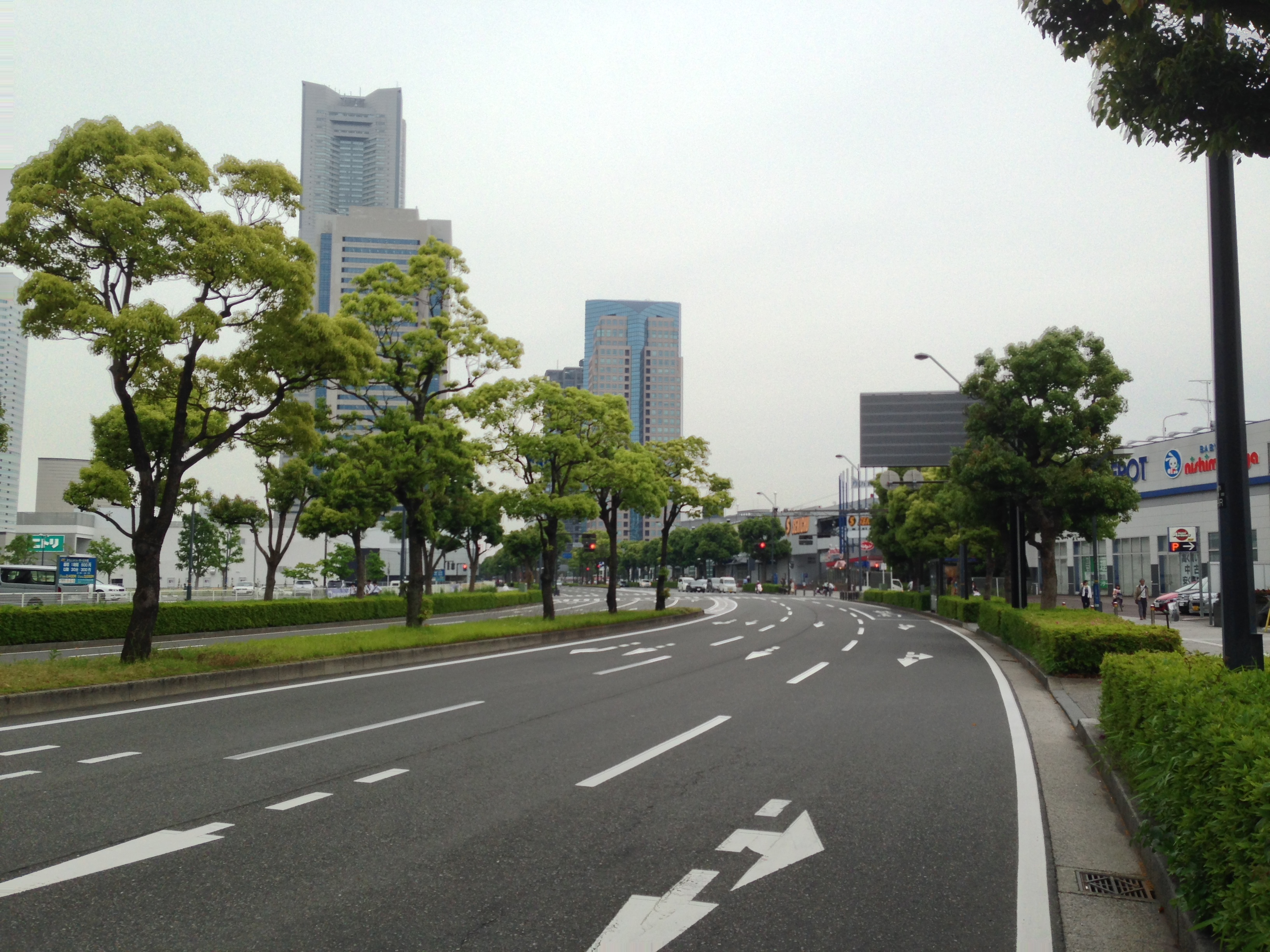 みなとみらい大通り（栄本町線）のスーパーオートバックス前辺りのカーブ。